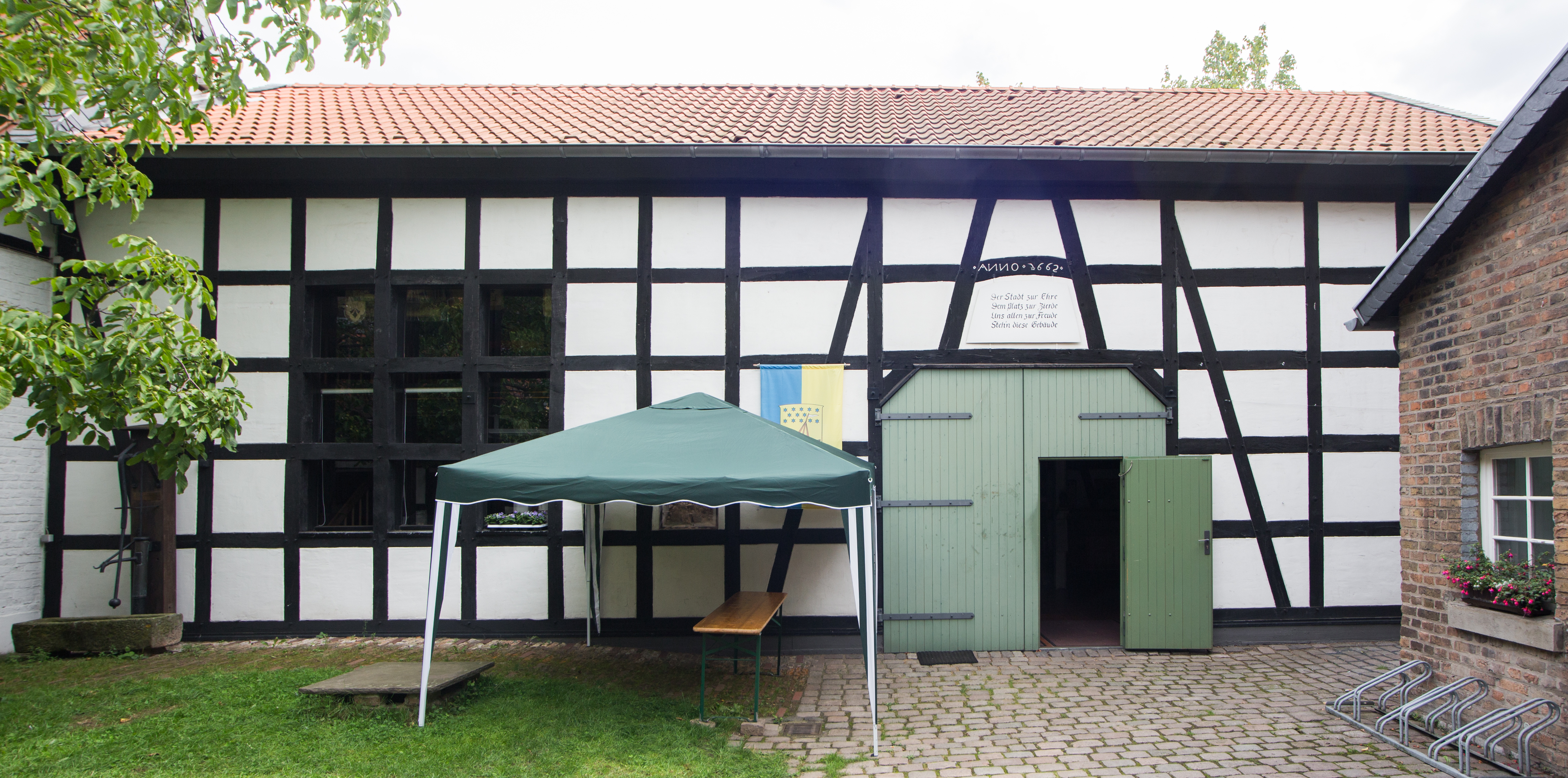 Heimatmuseum Beuel, Wagnergasse 2–4, Bonn-Beuel: Scheune von 1662, Blickrichtung Süden